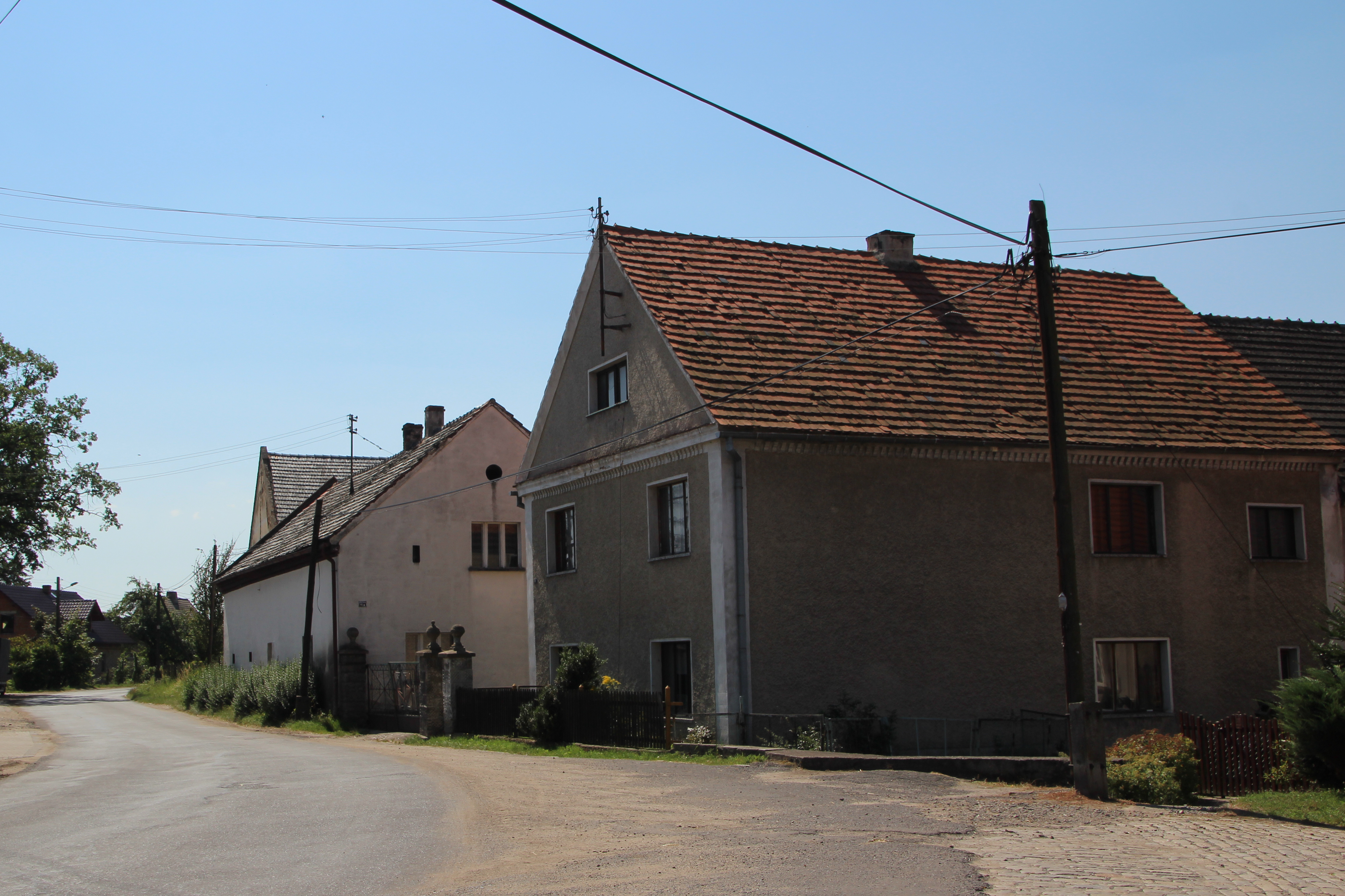 Rączka – wieś w Polsce położona w województwie opolskim, w powiecie nyskim, w gminie Korfantów.